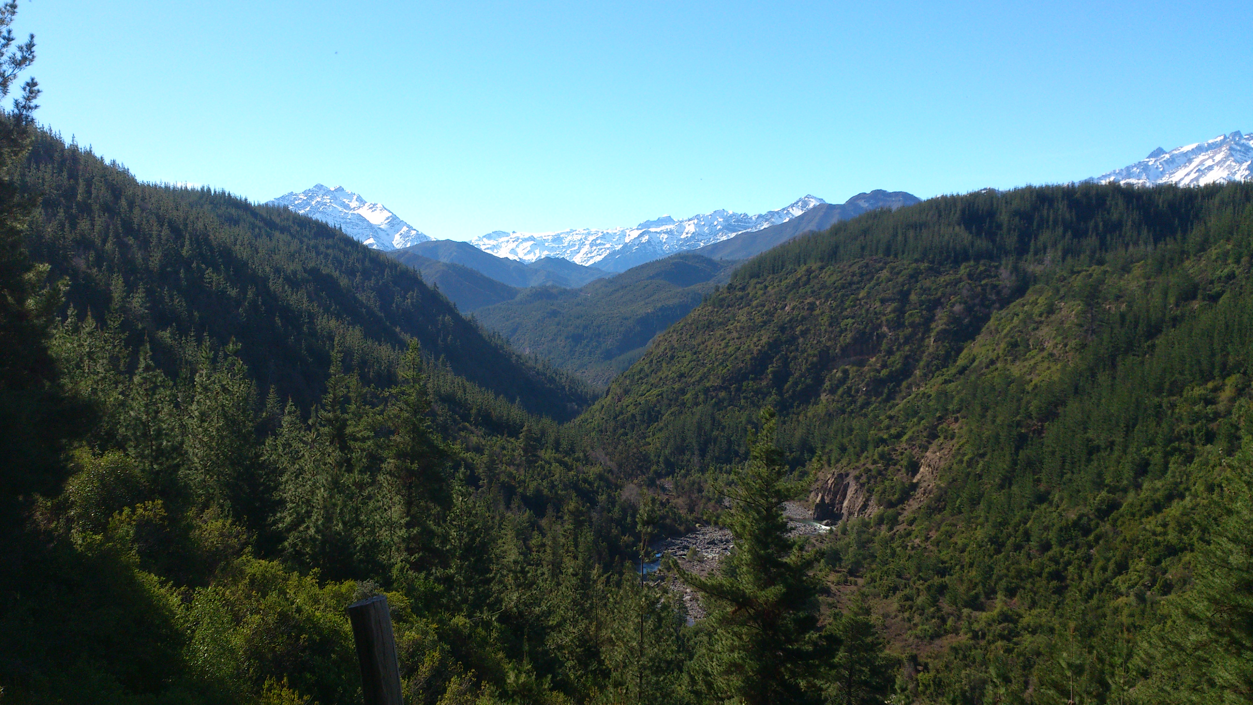 Paisaje del Sector.